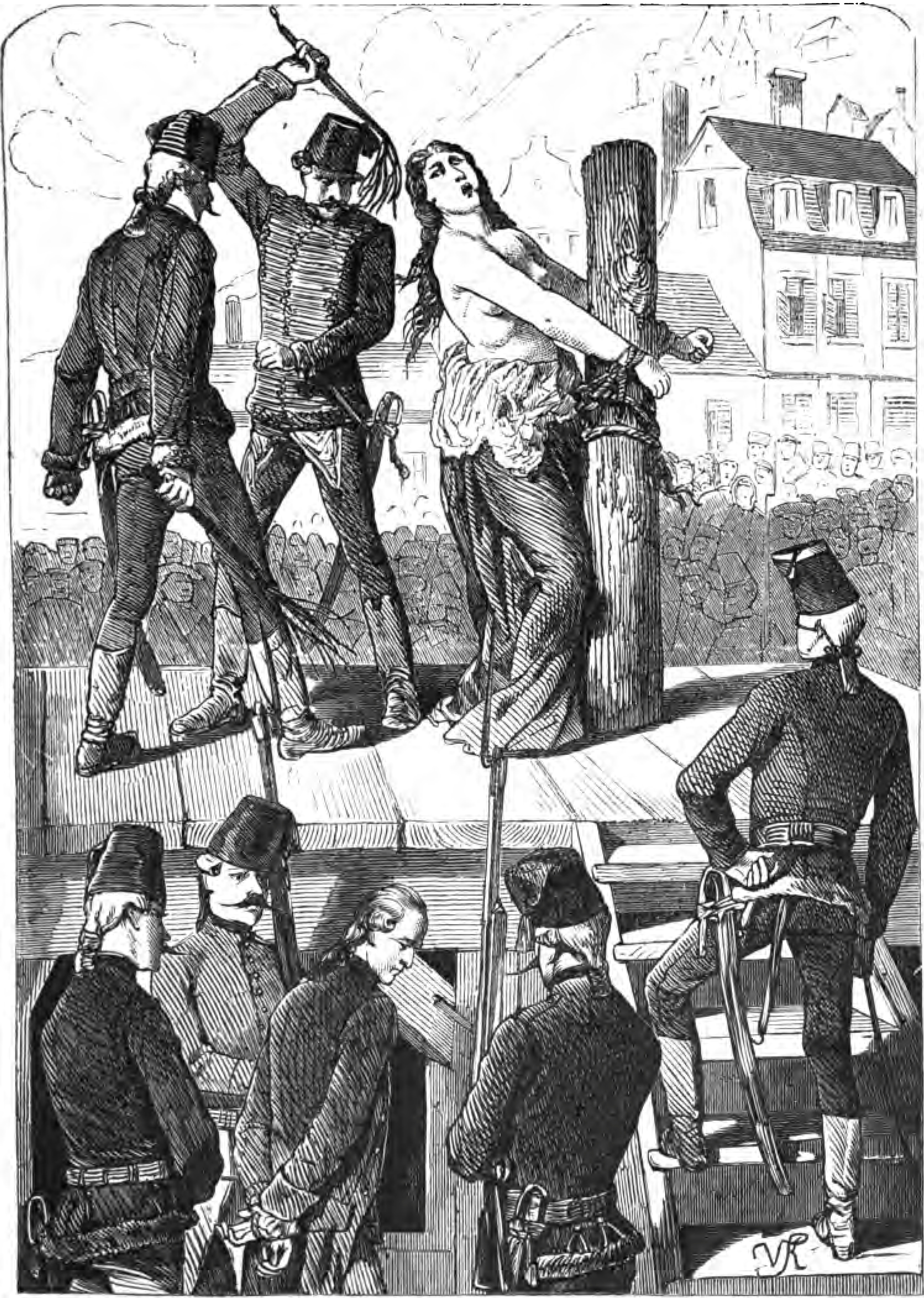 Bildunterschrift: Die Gattenmörderin von Pressburg